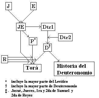 Hipótesis documentaria. Diagrama con textos en español